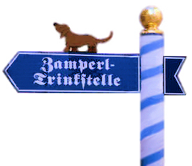 Wegweiser zur Zamperl Trinkstelle